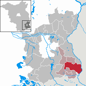 Neiße-Malxetal in Brandenburg (Country) - District Spree-Neiße